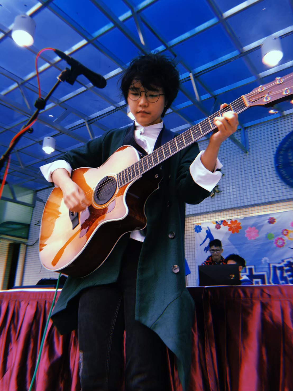 校園快閃 1105 穀保家商